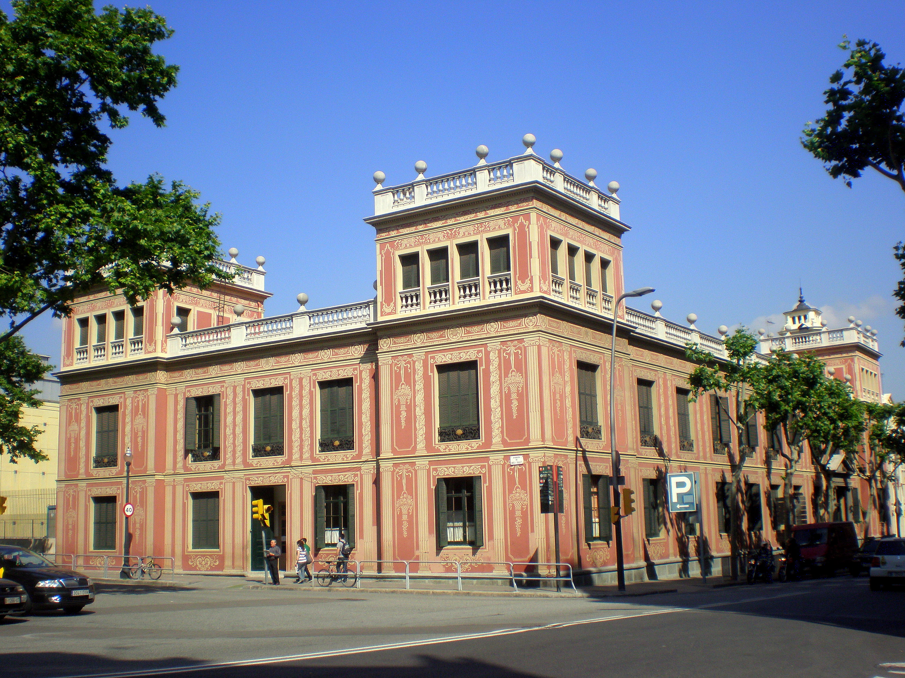 Barcelona - Centre escolar Mossèn Jacint Verdaguer del carrer Lleida, adjacent als Bombers